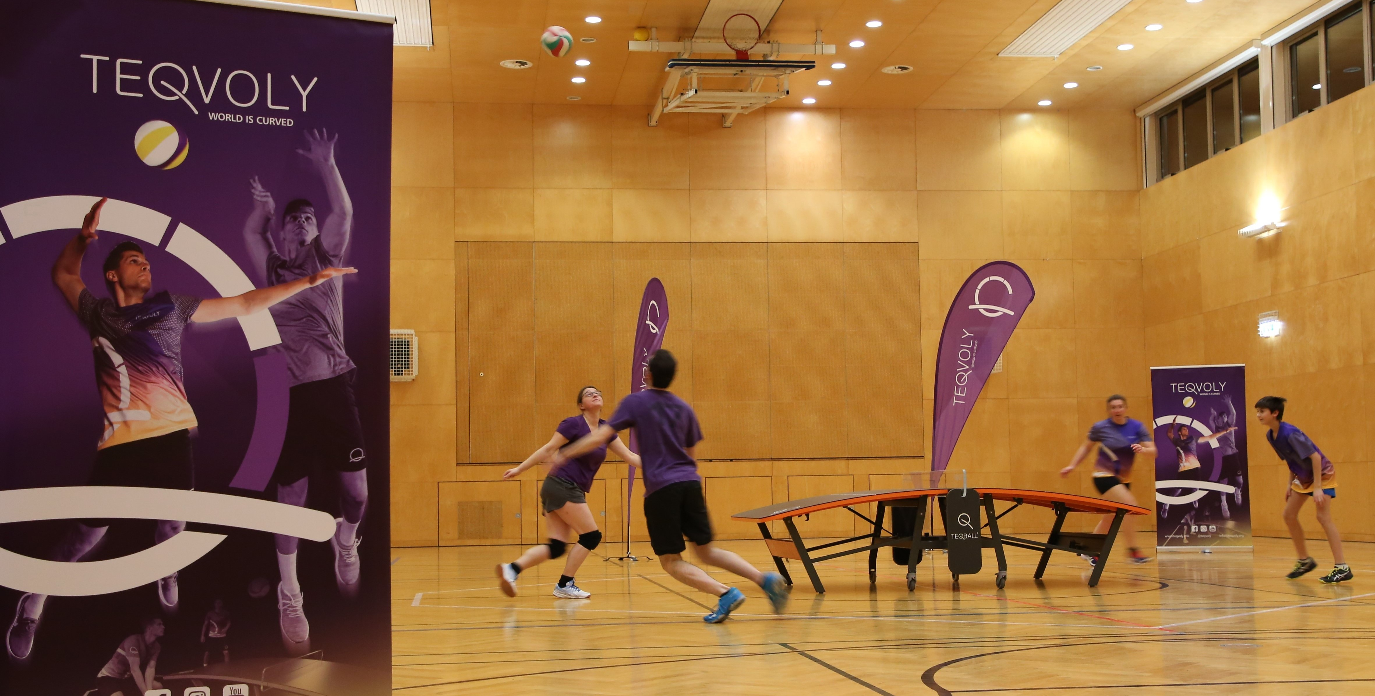 Spielsituation beim Teqvoly aufgenommen in Hart bei Graz im Jänner 2020.